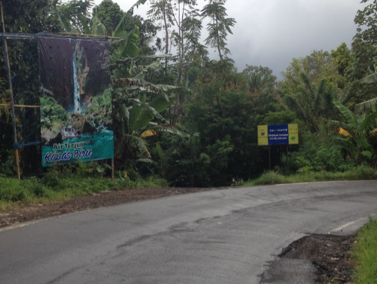 Jalan masuk dari arah Lumajang